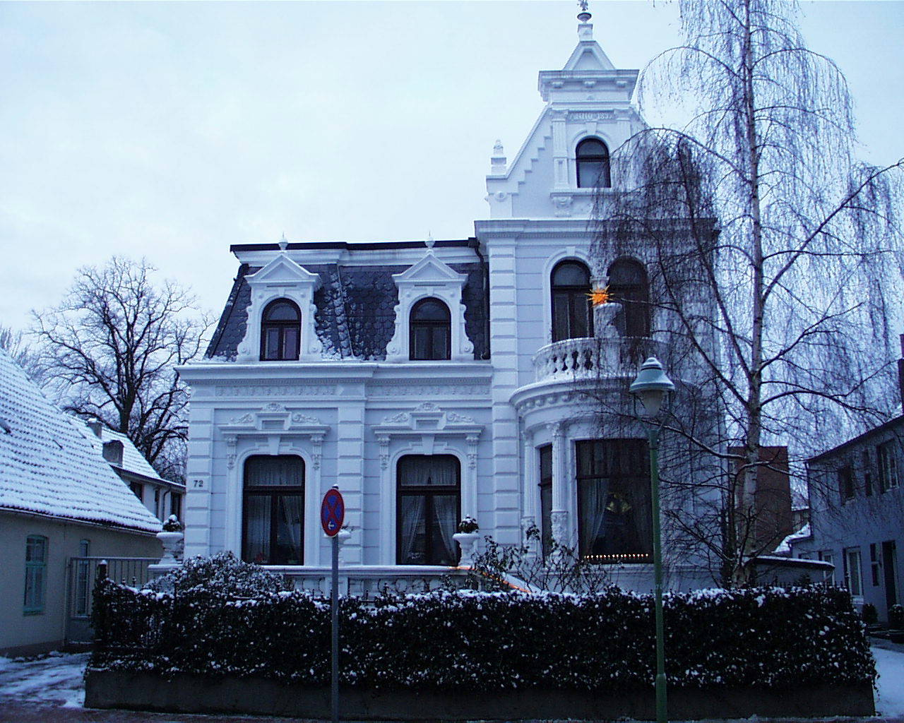 Villa Giese in Bremerhaven, Lange Straße 72. Das abgebildete Objekt ist ein geschütztes Kulturdenkmal in der Freien Hansestadt Bremen, mit der Nr. 1576 beim Landesamt für Denkmalpflege registriert.